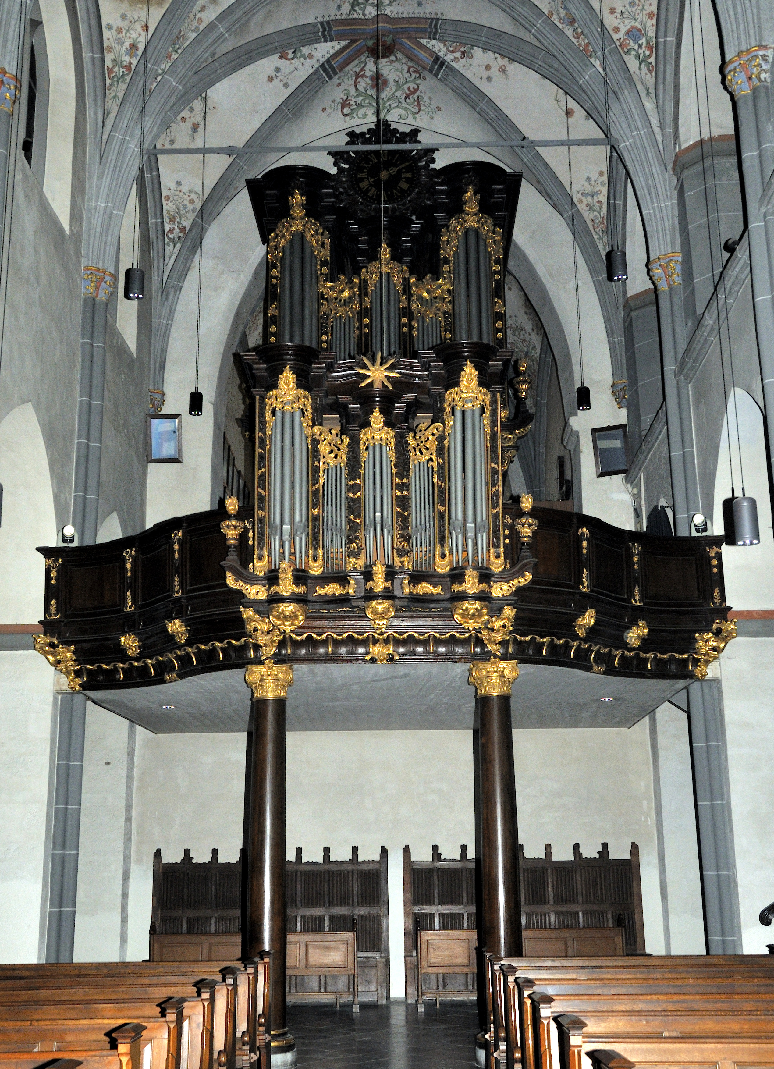 Orgel und Orgelgehäuse in St. Kornelius, Aachen-Kornelimünster; Orgelgehäuse von Johann Joseph Couven, 1763